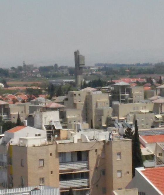 כך נראה מגדל המים (ברחוב אזר) של כפר סבא ממרפסת